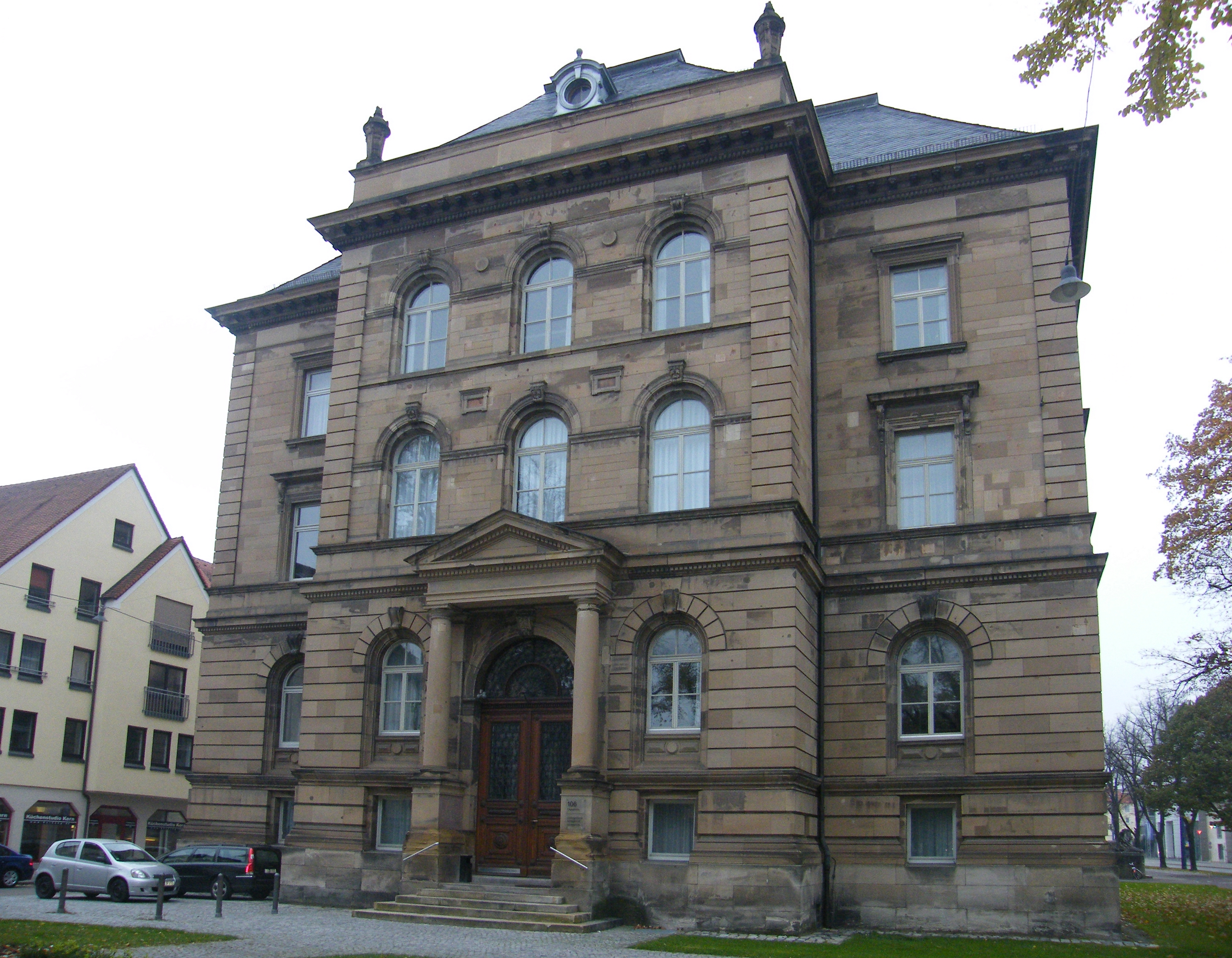 Das Amtsgericht Ulm